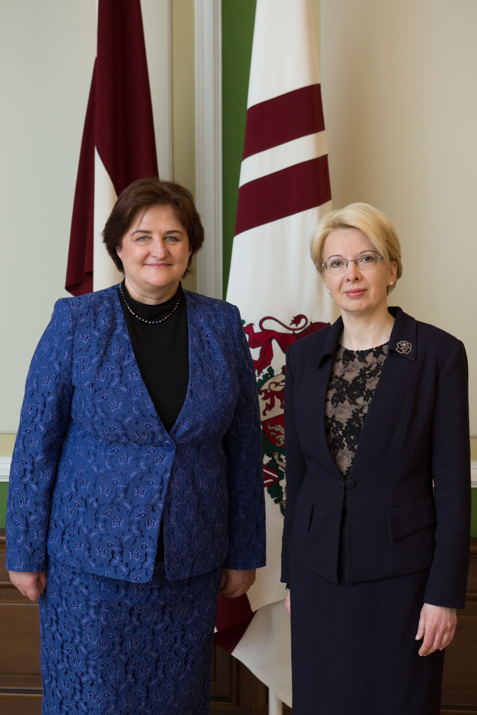 2015.gada 5.maijs. Saeimas priekšsēdētāja Ināra Mūrniece tiekas ar Lietuvas parlamenta priekšsēdētāju Loretu Graužinieni (Loreta Graužinienė). Foto: Ernests Dinka, Saeimas Kanceleja Izmantošanas noteikumi: saeima.lv/lv/autortiesibas